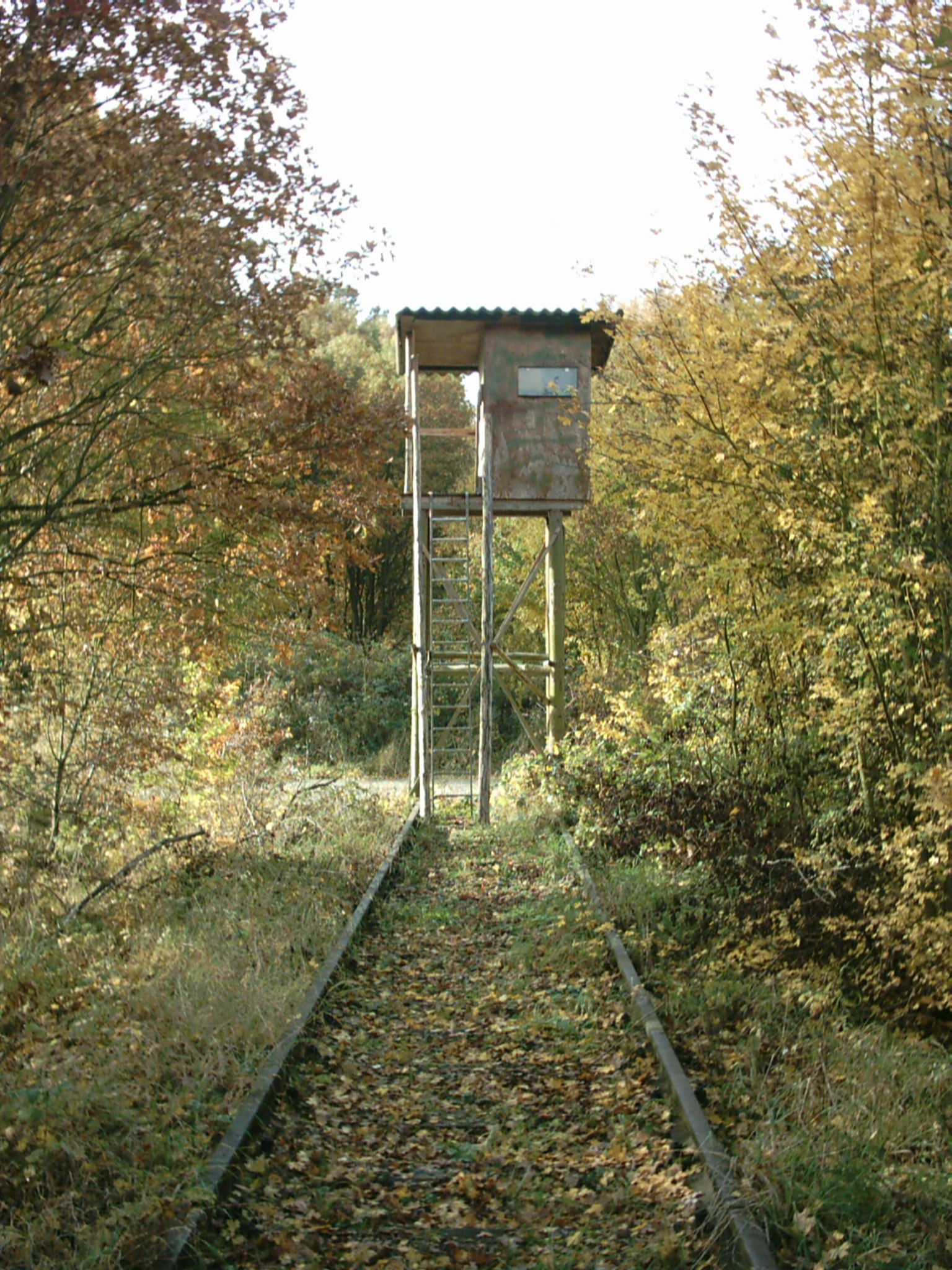 Hannöversche Südbahn: Streckenrelikt Herbst 2005 bei Oberscheden - selbst fotografiert Okt. 2005